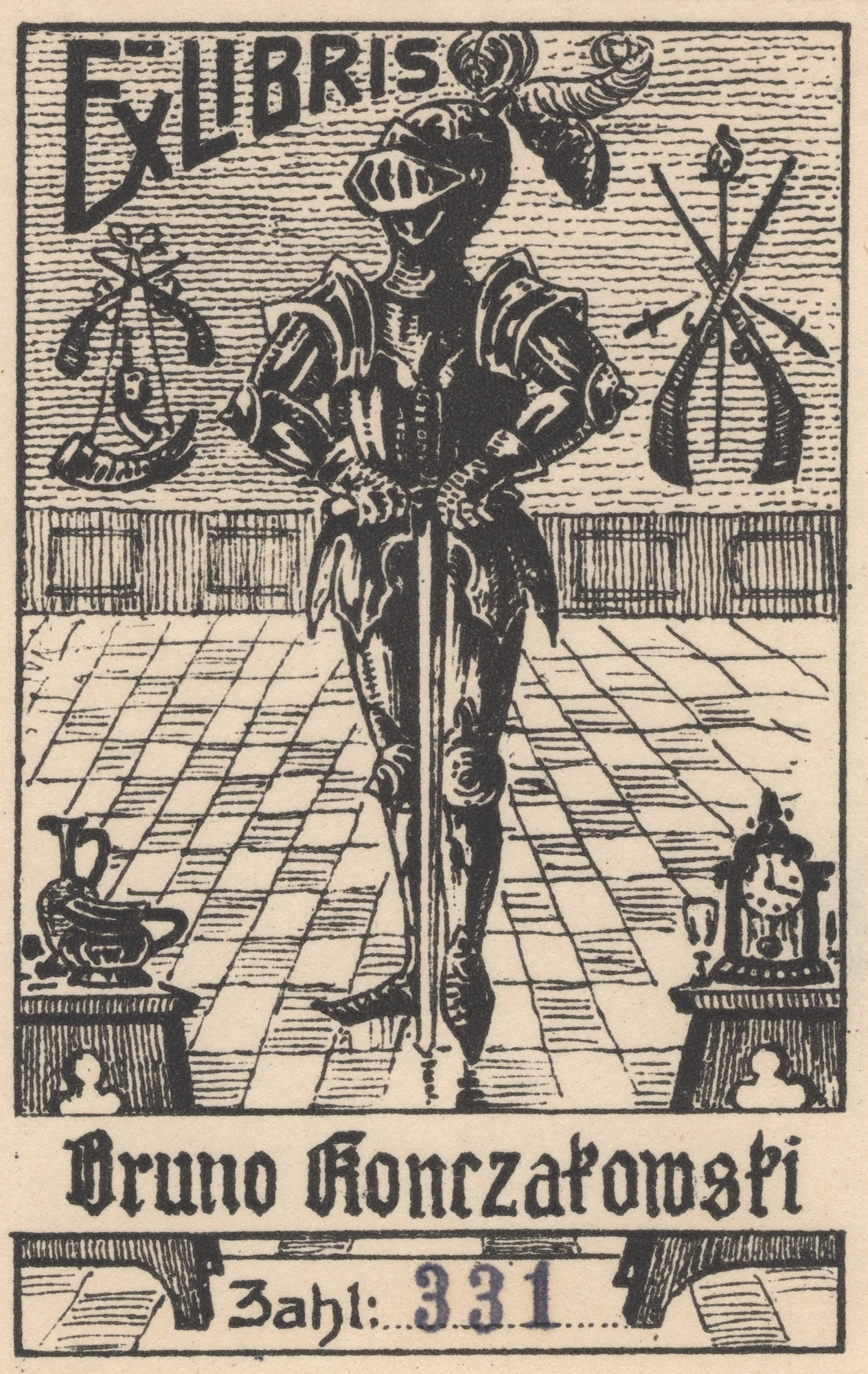 Ex Libris kolekcjonera Bruno Konczakowskiego z Cieszyna